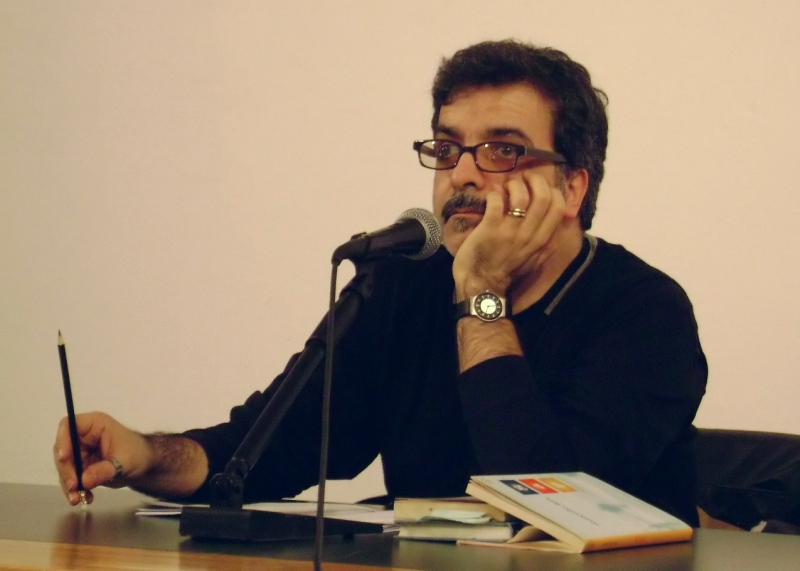 Marcello Fois, Biblioteca Delfini, Modena